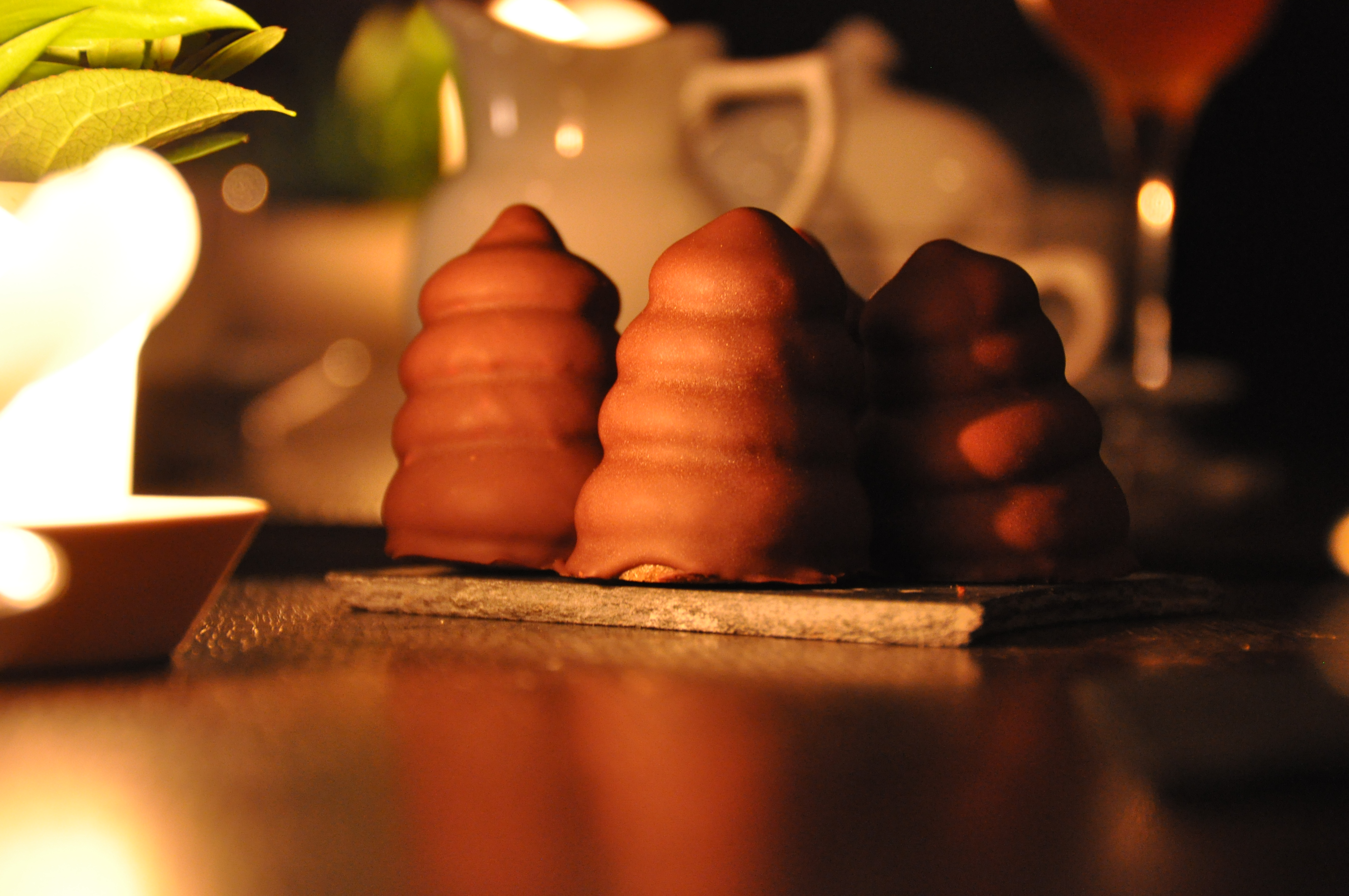 Flødeboller med hindbærskum